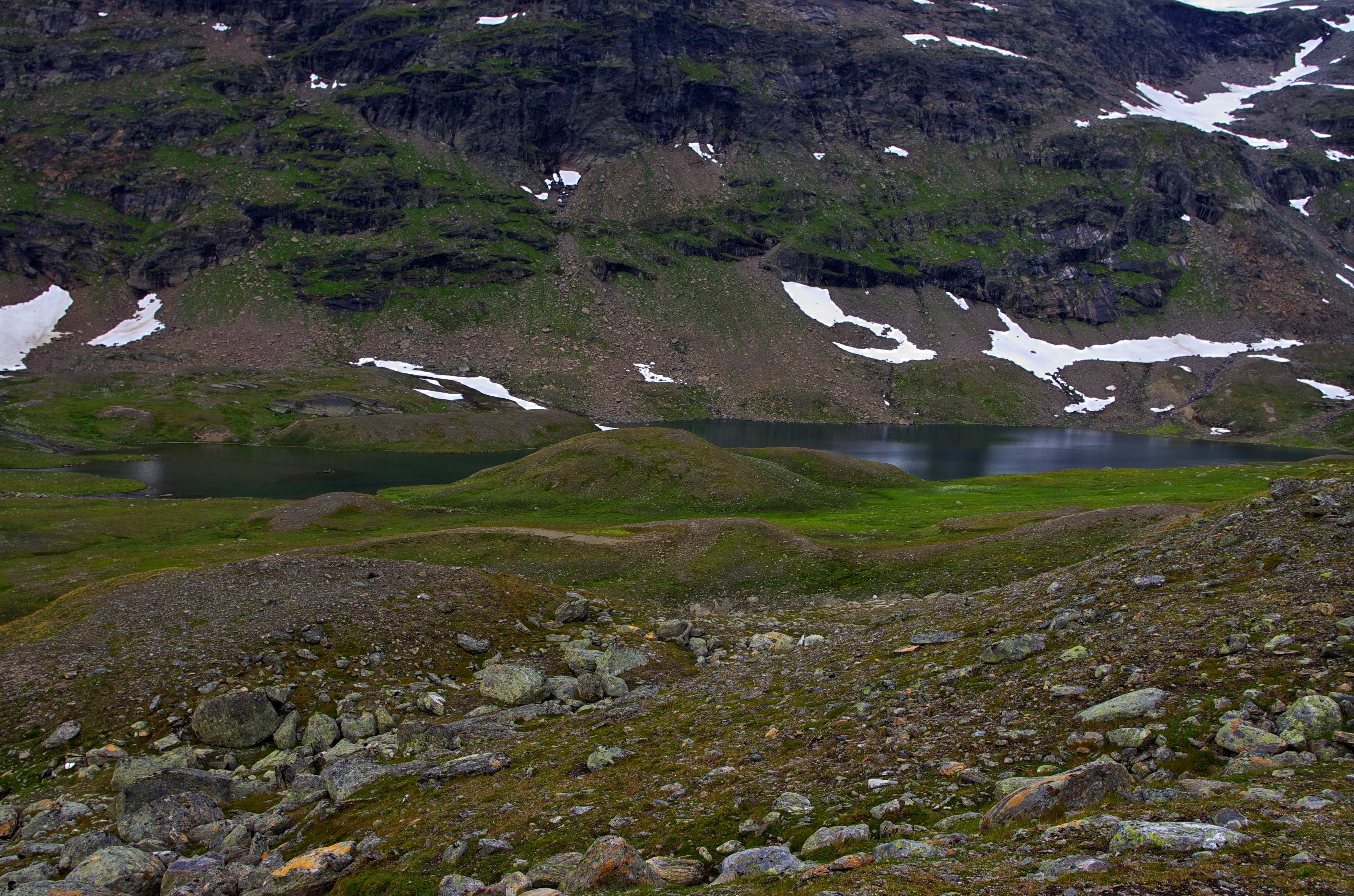 Moskosjaure eller Måskoesjaevrie är en sjö i Storumans kommun i Lappland.